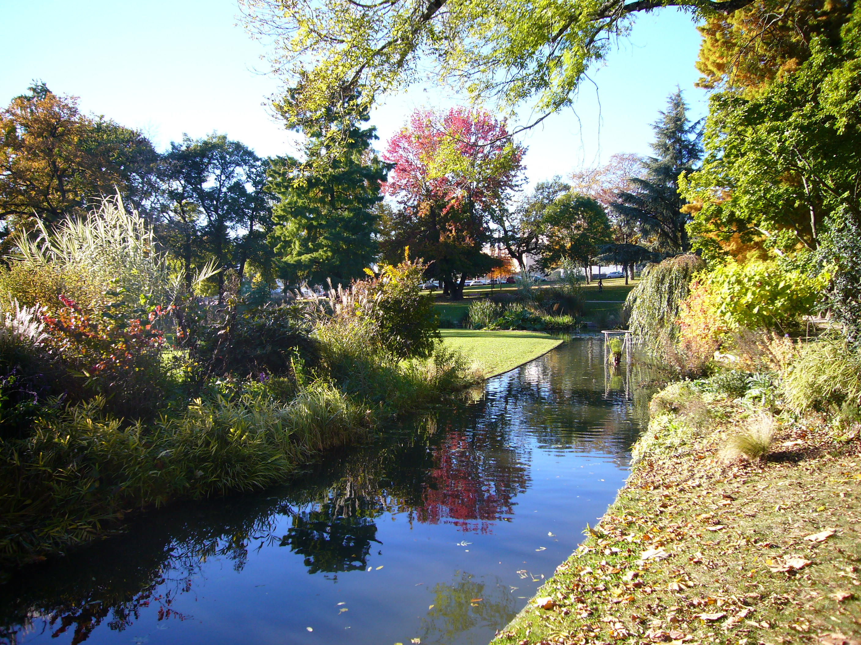 Rivière anglaise du parc Victor Thuillat de Limoges (87, France)